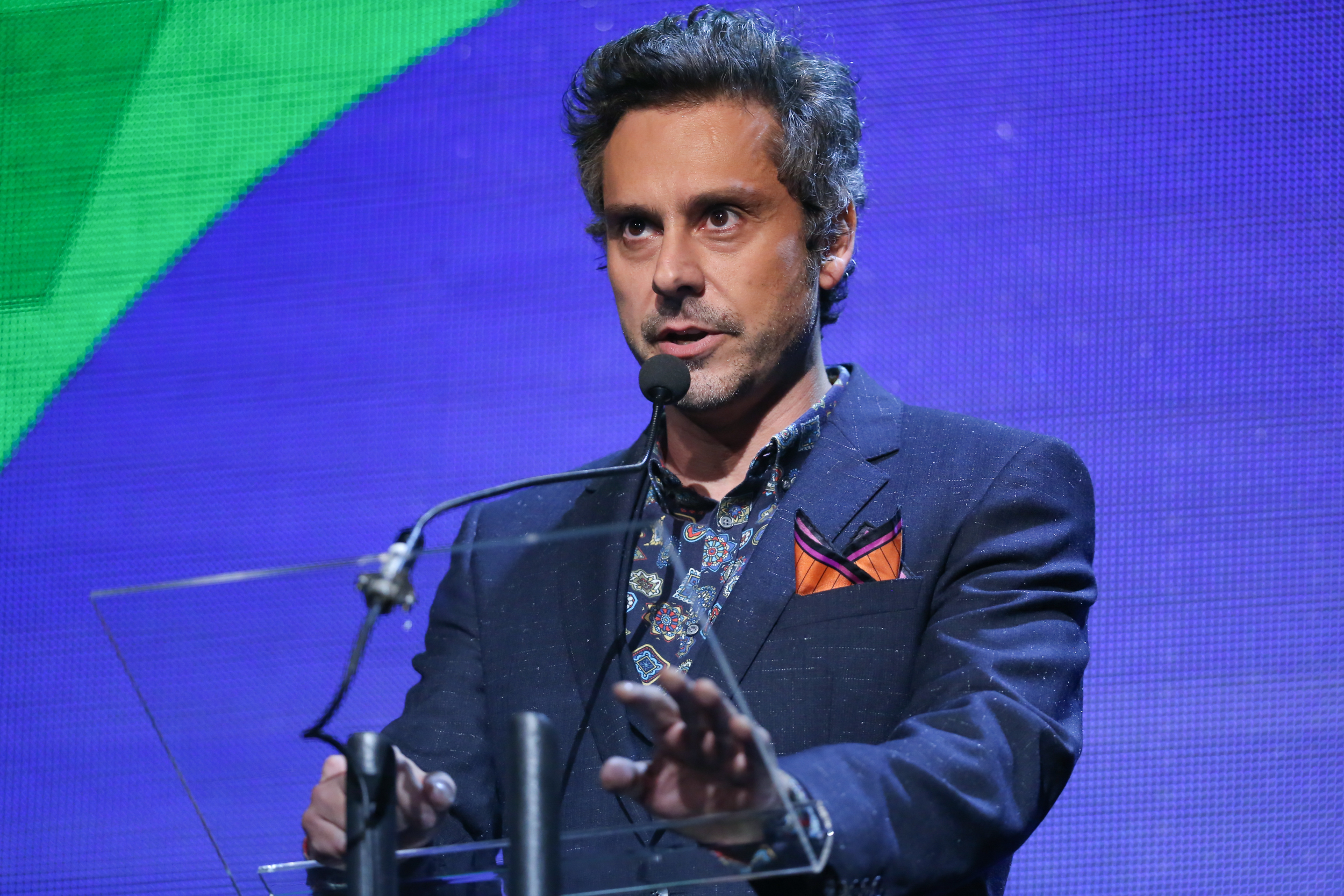 Alexandre Nero - 26° Prêmio da Música Brasileira 2015, no Theatro Municipal, no Centro do Rio de Janeiro/RJ. (10/06/15) Foto: Roberto Filho/Divulgacão